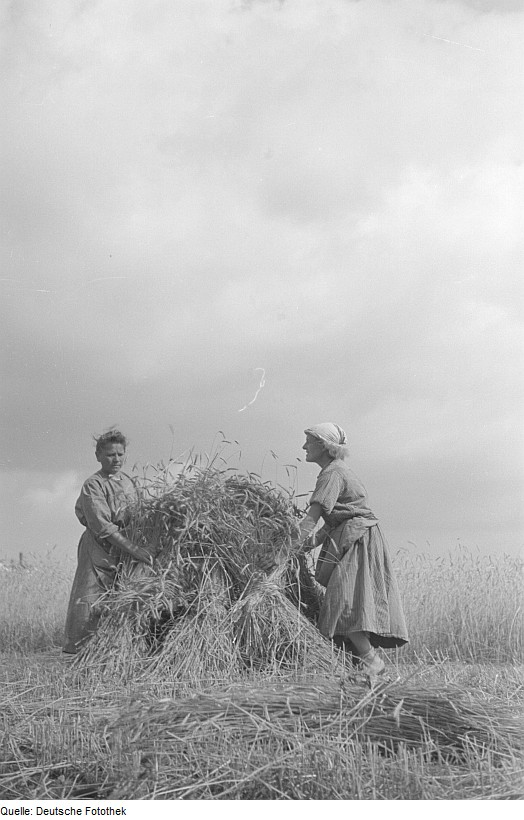 Original image description from the Deutsche Fotothek Herbst 1946